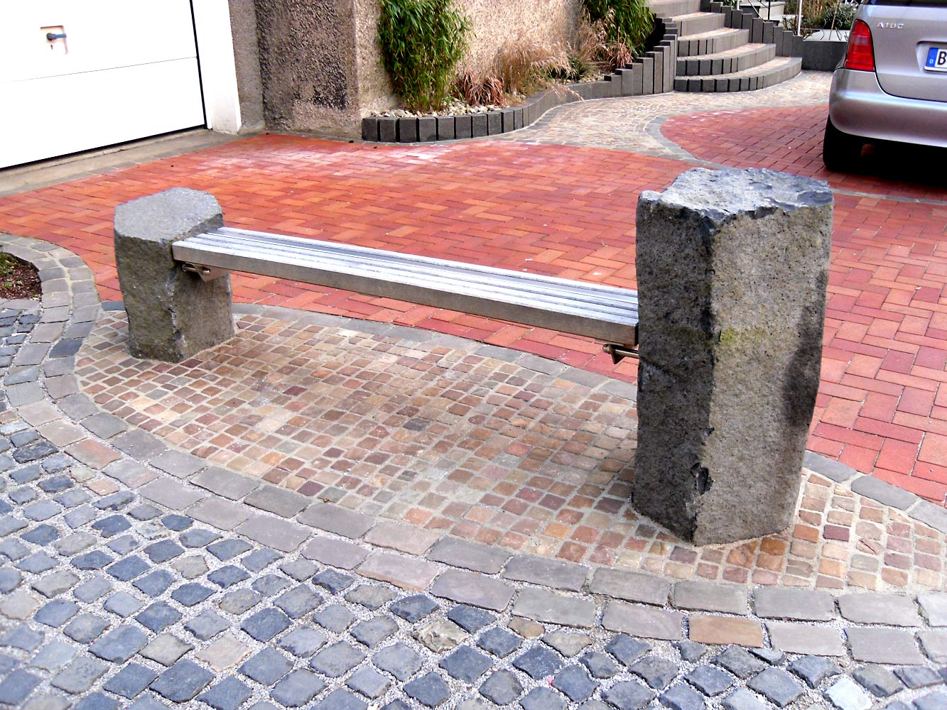 Bochum-Altenbochum. Die Bank mit den basaltenen Stielen in der Goystraße.